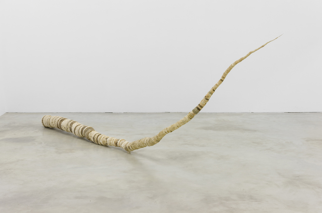 praca Szymona Kobylarza pt. 232, zdjęcie autora